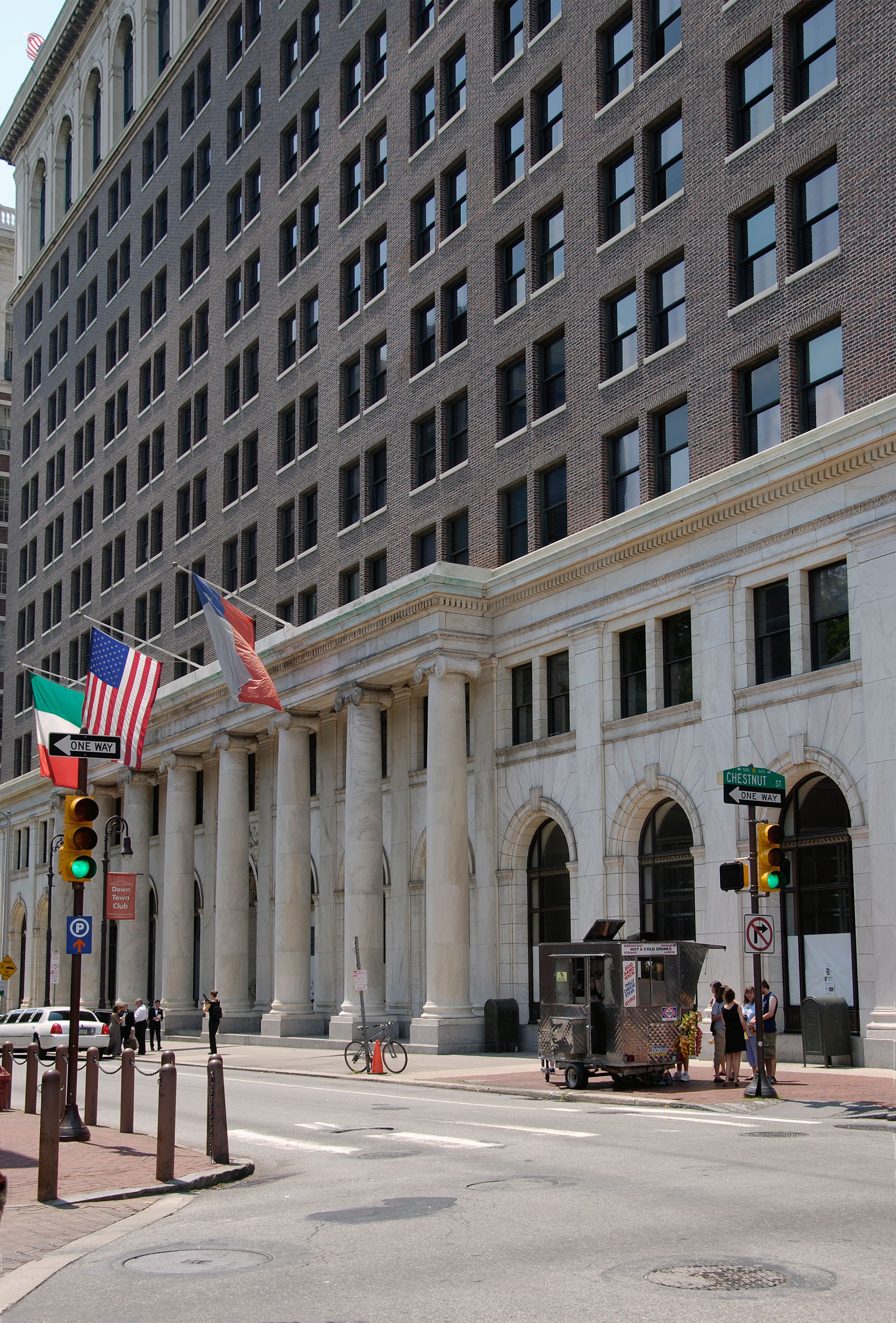 La facciata del palazzo che ospitava la sede del giornale